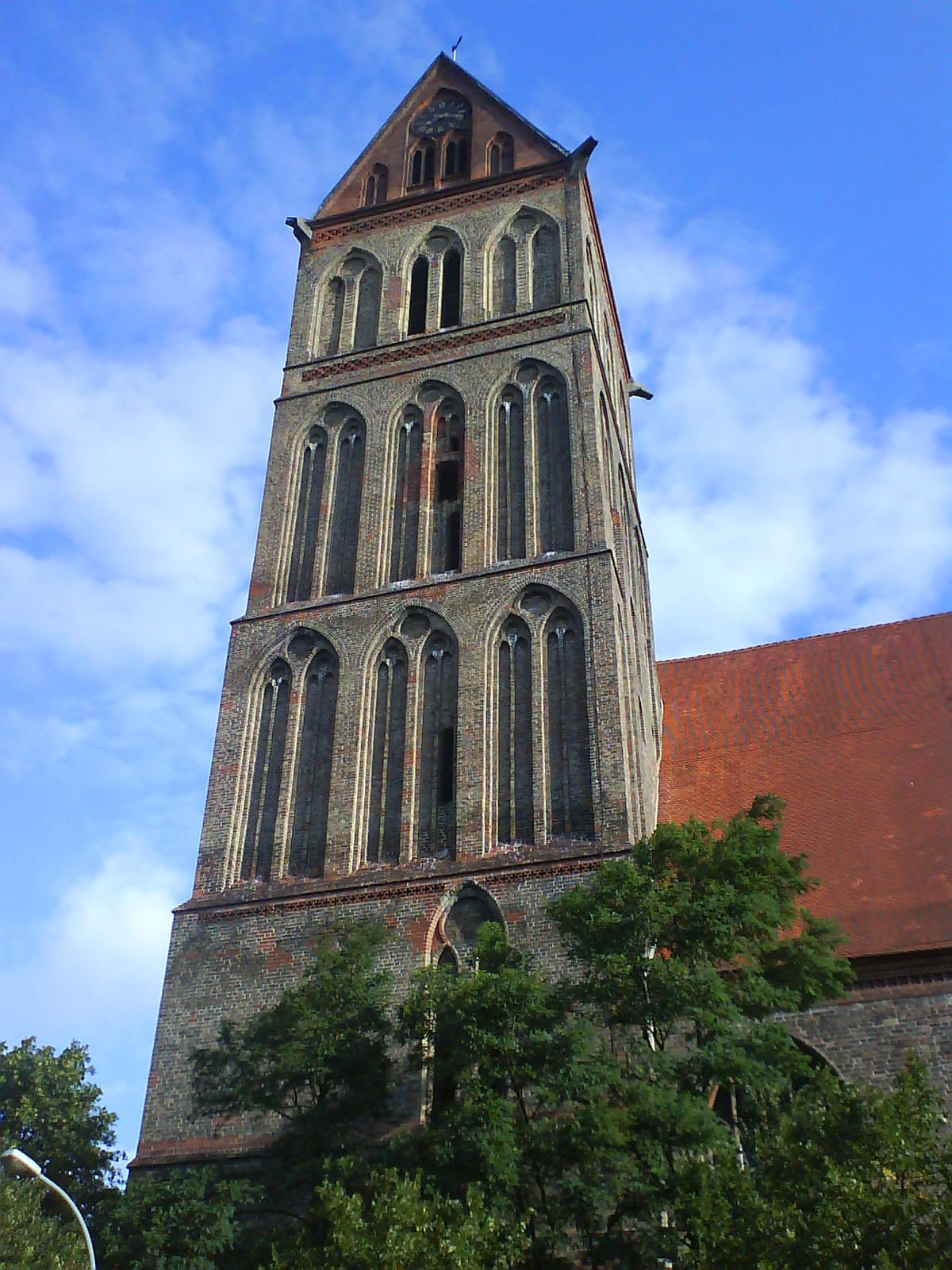 Turm der Marienkirche in Anklam von Süden